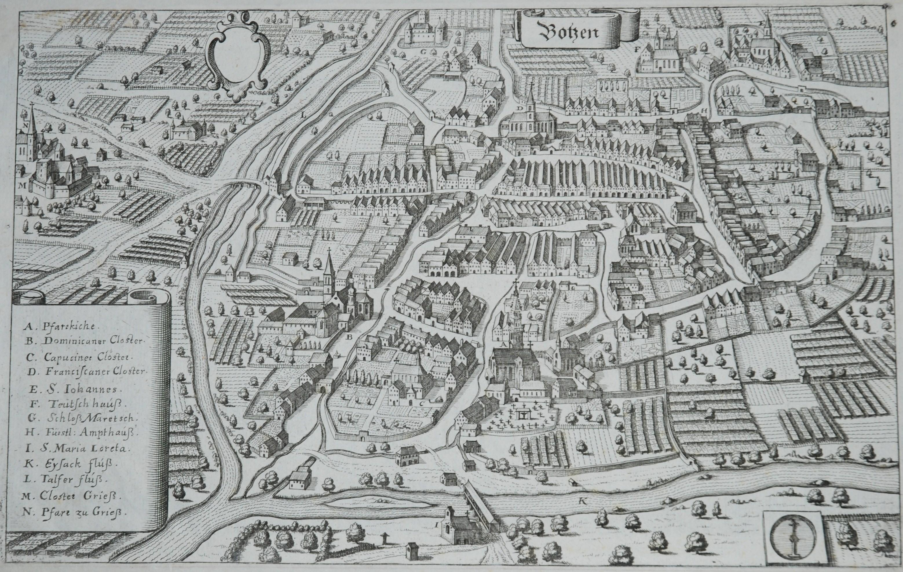 Originalkupferstich von "Botzen" aus M. Merian "Topographia Provinciarum Austriacarum Austriae”, Frankfurt 1649 ff., 19,5 x 30,5 cm